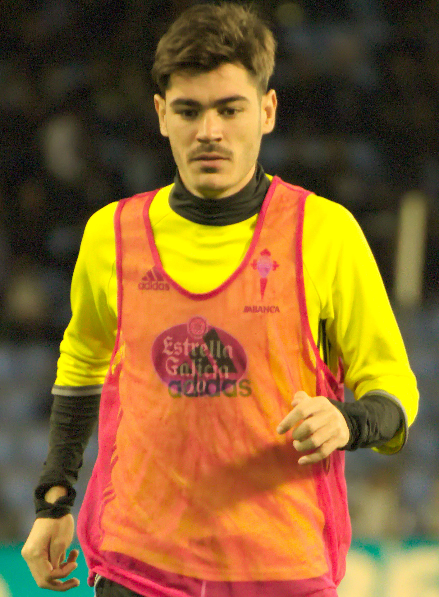 Jozabed Sánchez Ruiz - RC Celta de Vigo